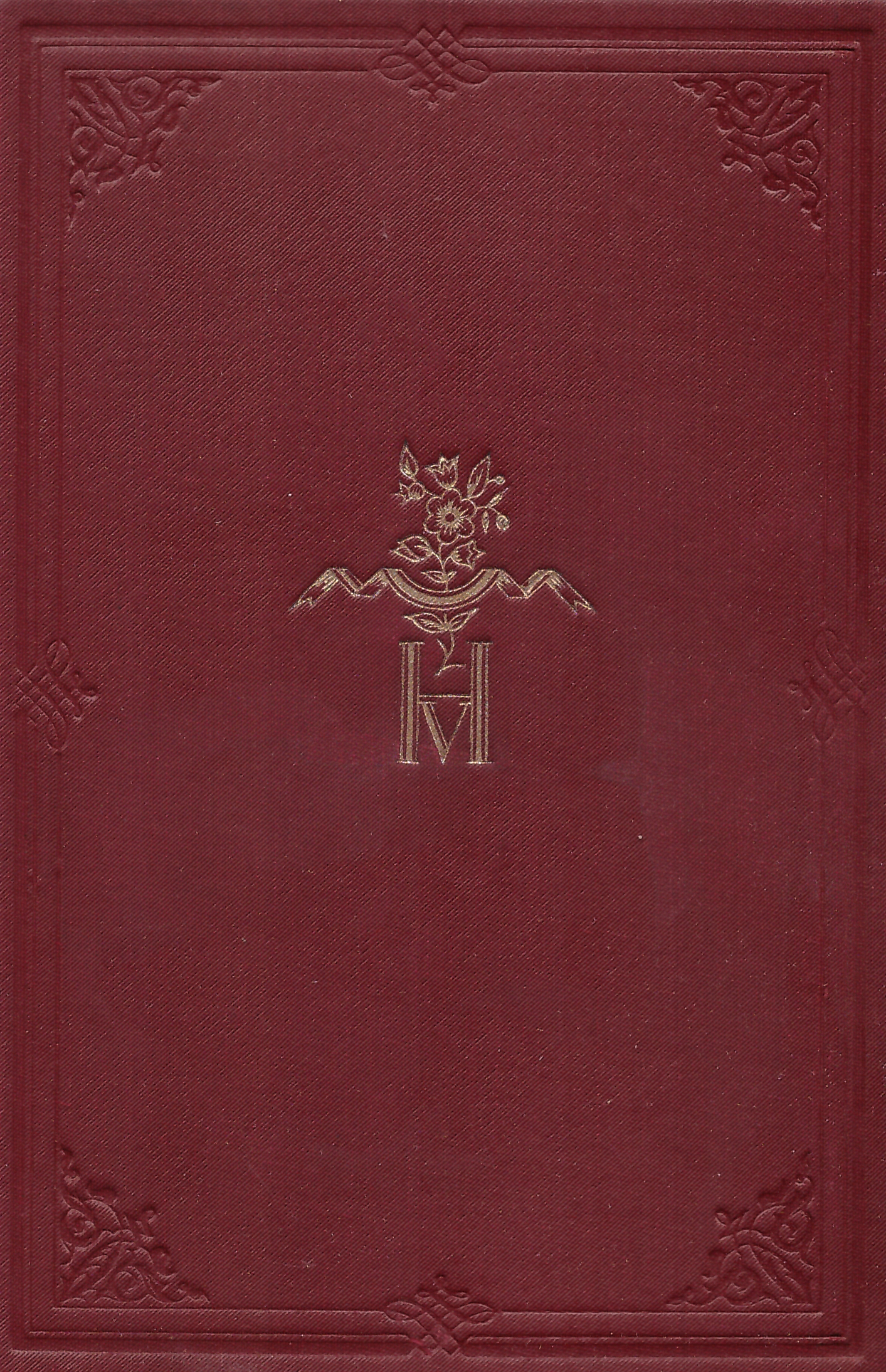 Victor Hugo (1802-1885): A tenger munkásai (Gutenberg Könyvkiadó Vállalat, Budapest, 1920-as évek)